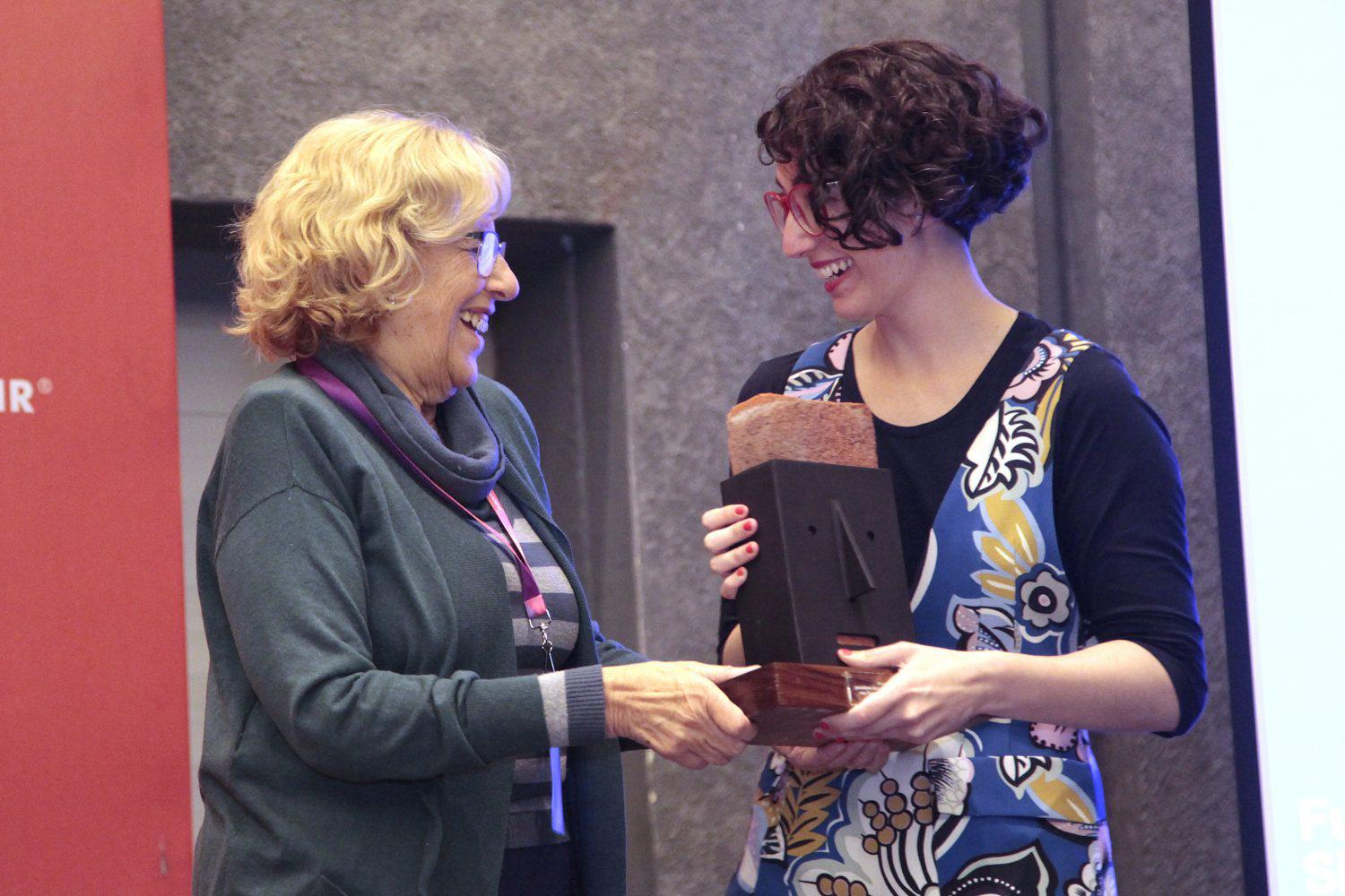 La Feria Internacional del Libro de Guadalajara ha sido el marco de la entrega de premios del galardón “Narra la Ciudad. I Premio de Novela Gráfica-Ciudades Iberoamericanas”, un reconocimiento que aspira a impulsar las expresiones culturales que giran en torno a las dinámicas de la ciudad y a crear espacios de consenso y diálogo a través de la cultura. El certamen está organizado por la Unión de Ciudades Capitales Iberoamericanas (UCCI), el Ayuntamiento de Madrid y la editorial Sexto Piso.